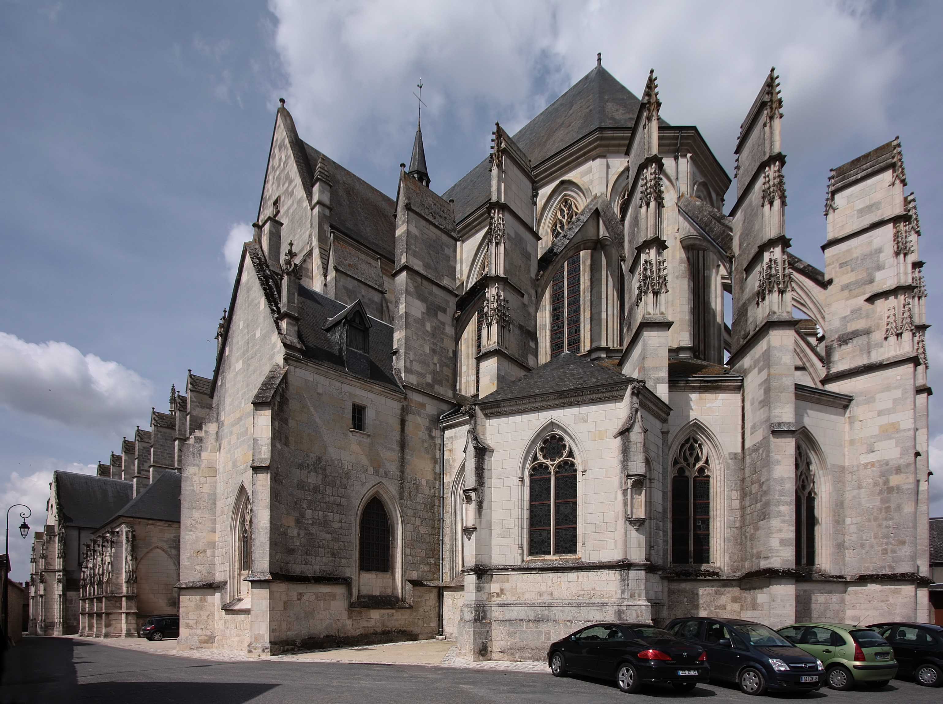 Kirche Notre-Dame de Cléry in der Gemeine Cléry-Saint-André, Département Loiret/Frankreich - Chorseite